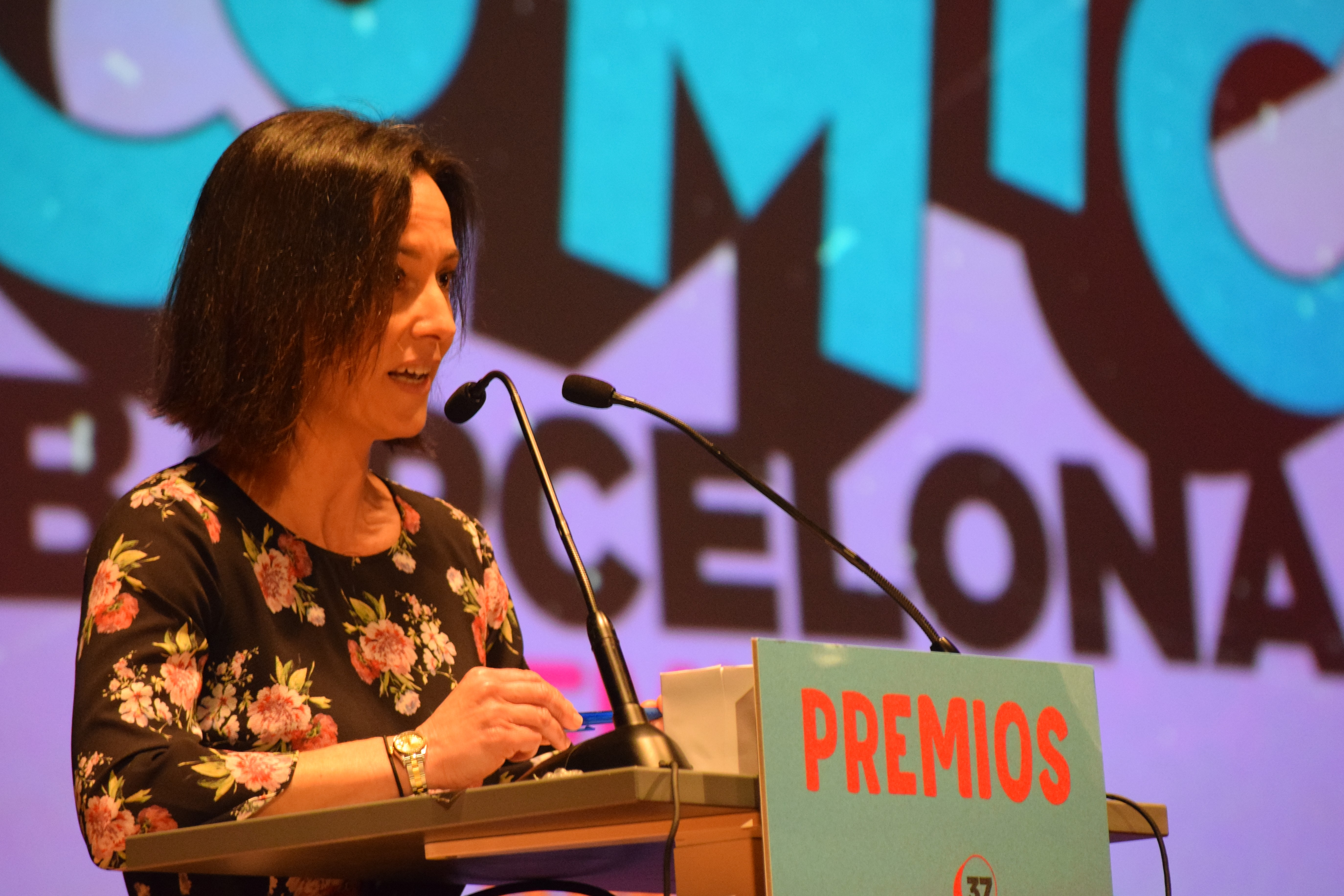 Meritxell Puig, directora del 37. Còmic Barcelona, pronunciant un discurs durant la cerimònia d'entrega dels premis.